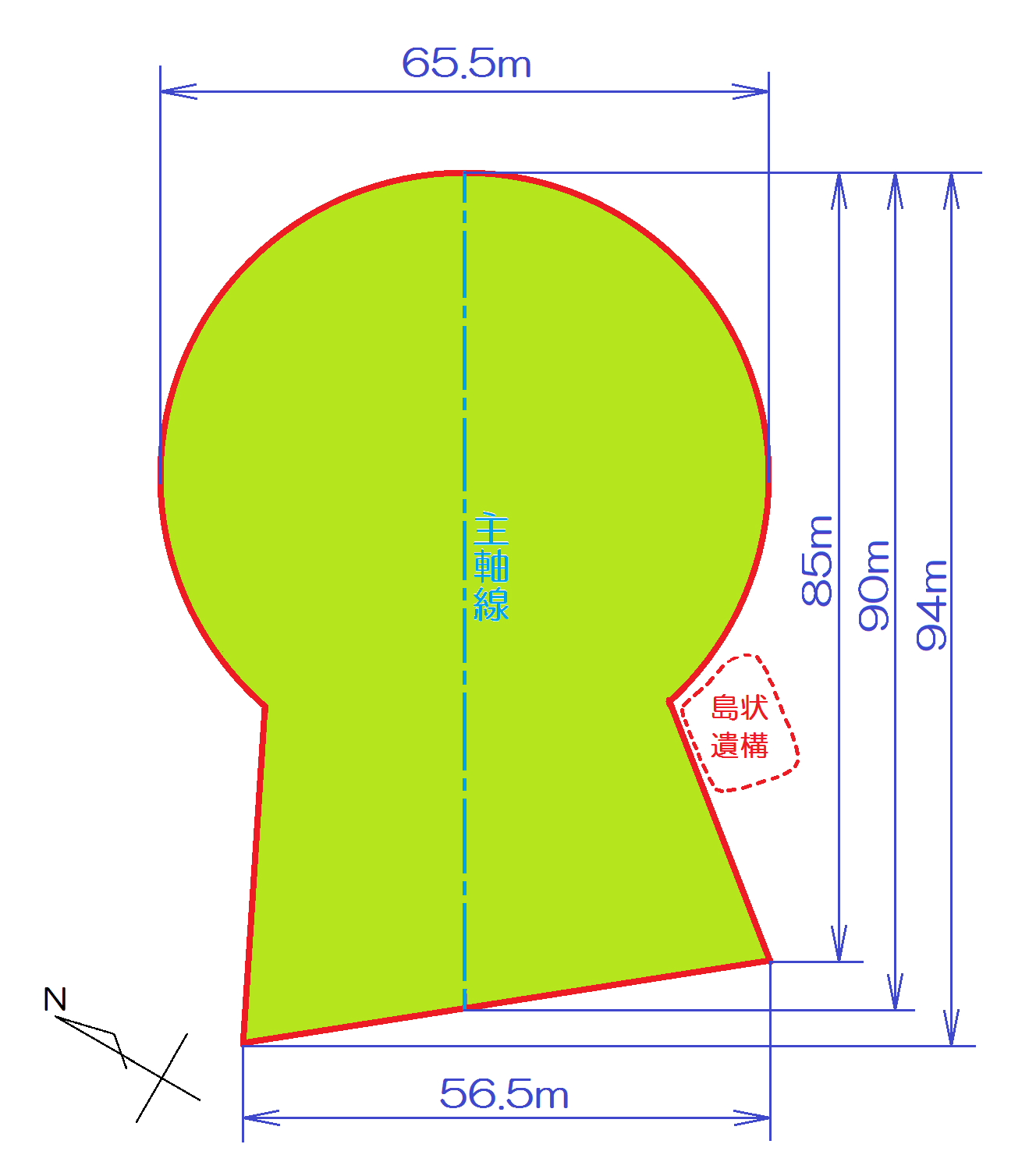 愛知県西尾市正法寺古墳墳形の模式図。 「第5章 考察」『史跡正法寺古墳』吉良町教育委員会（2005年）をもとに投稿者が作図。